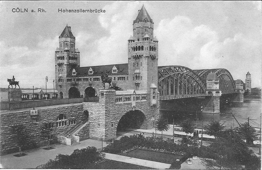 Postkaart van de Hohenzollernbrücke in 1912